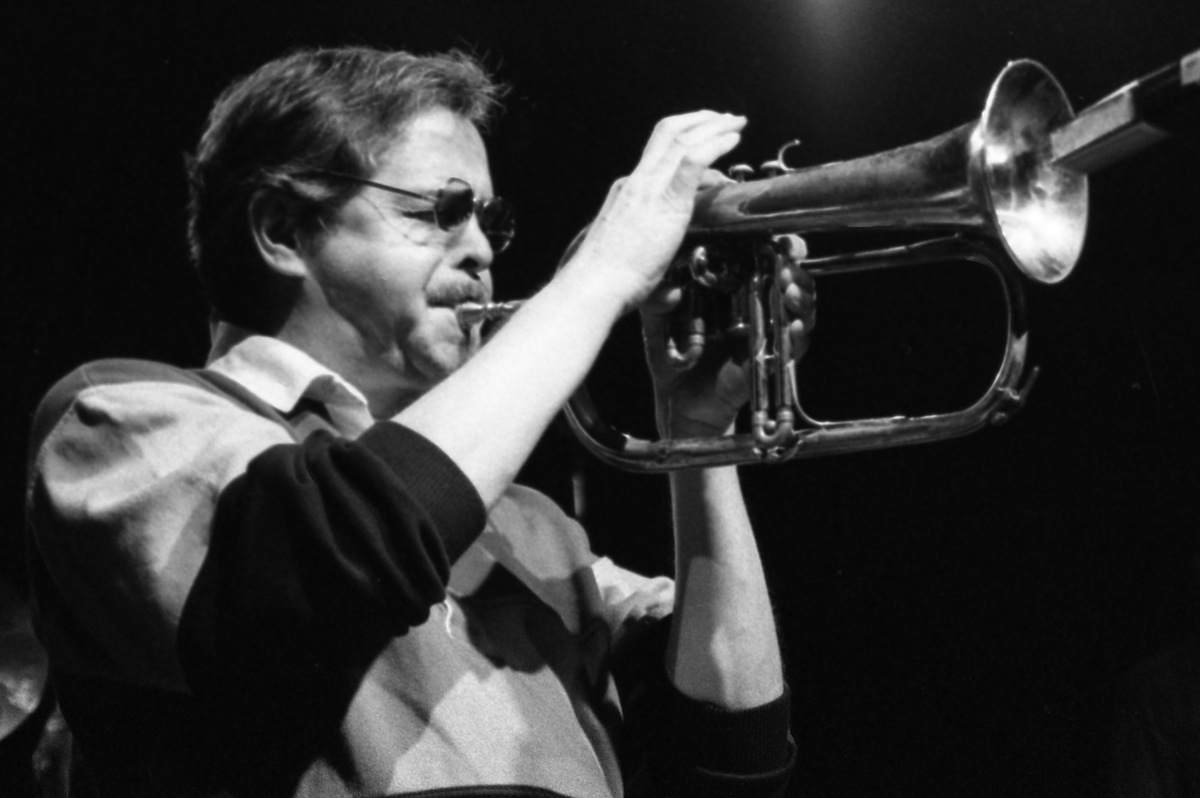 Kenny Wheeler (United Jazz + Rock Ensemble), 23.11.1992, Braunschweig, Jolly Joker